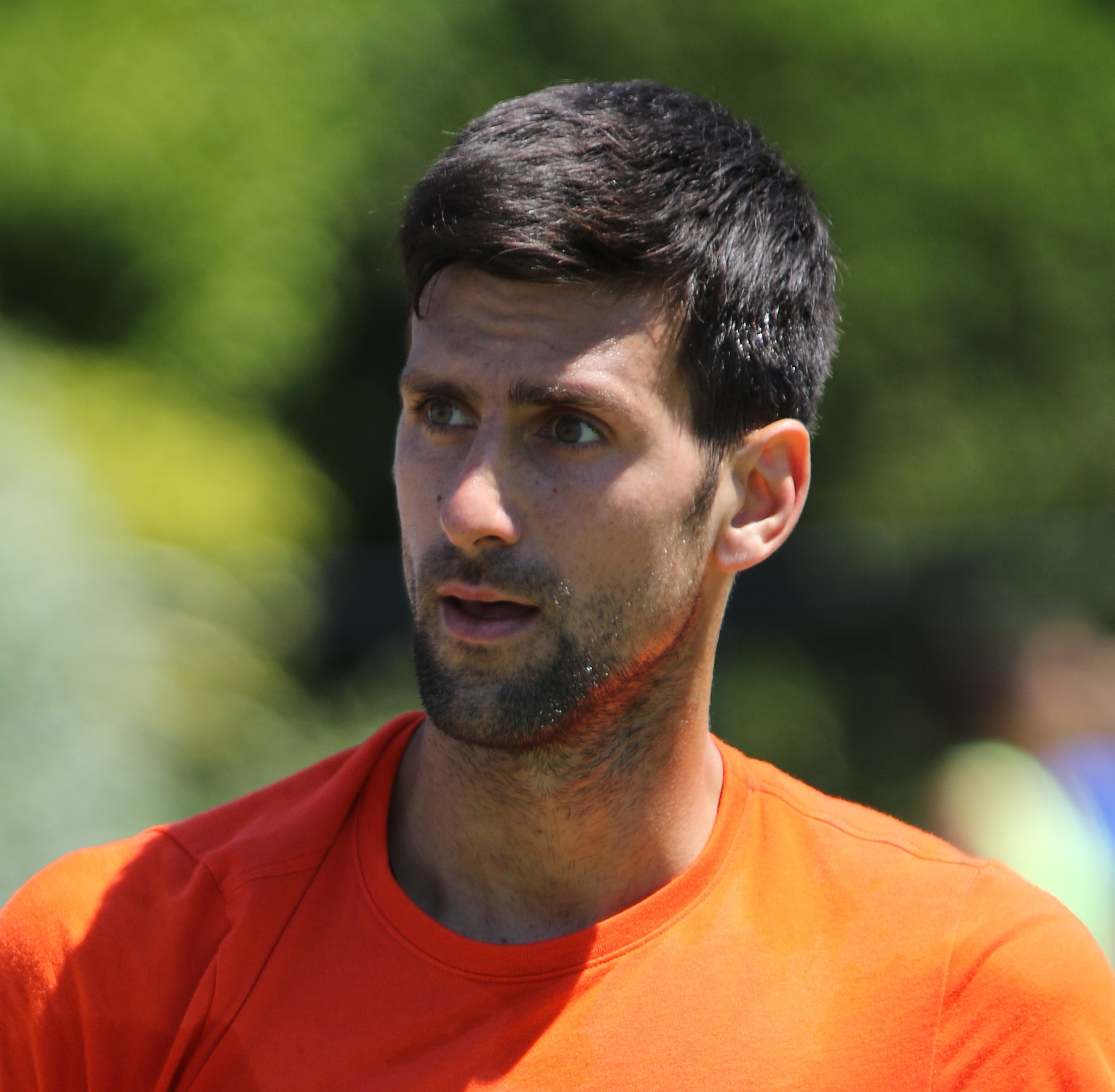 Novak Djokovic